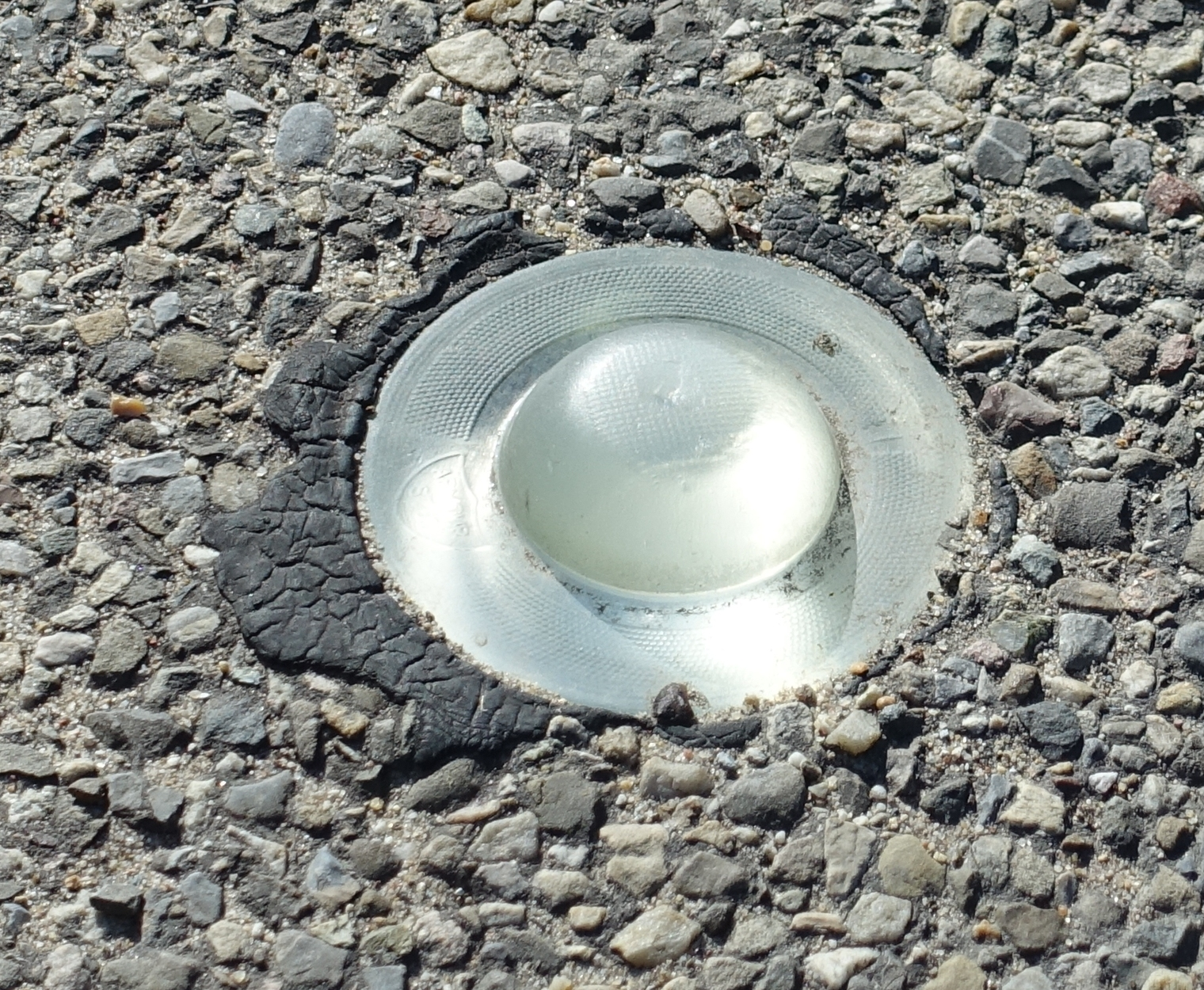 Glasbolreflector in asfalt Woerden Rembrandtlaan